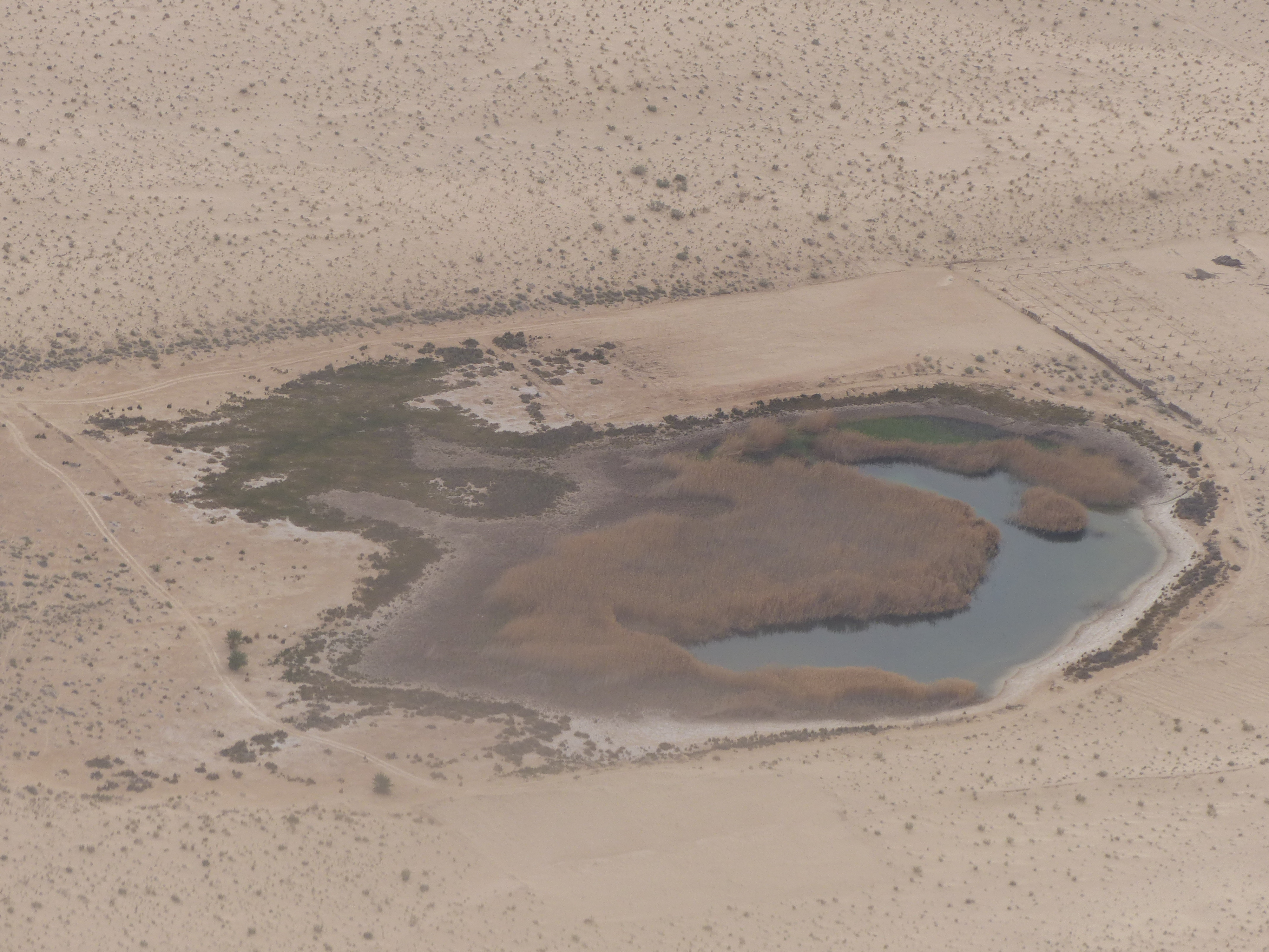 Point d'eau aux abords de l'aéroport de Tozeur-Nefta, gouvernorat de Tozeur, Tunisie.